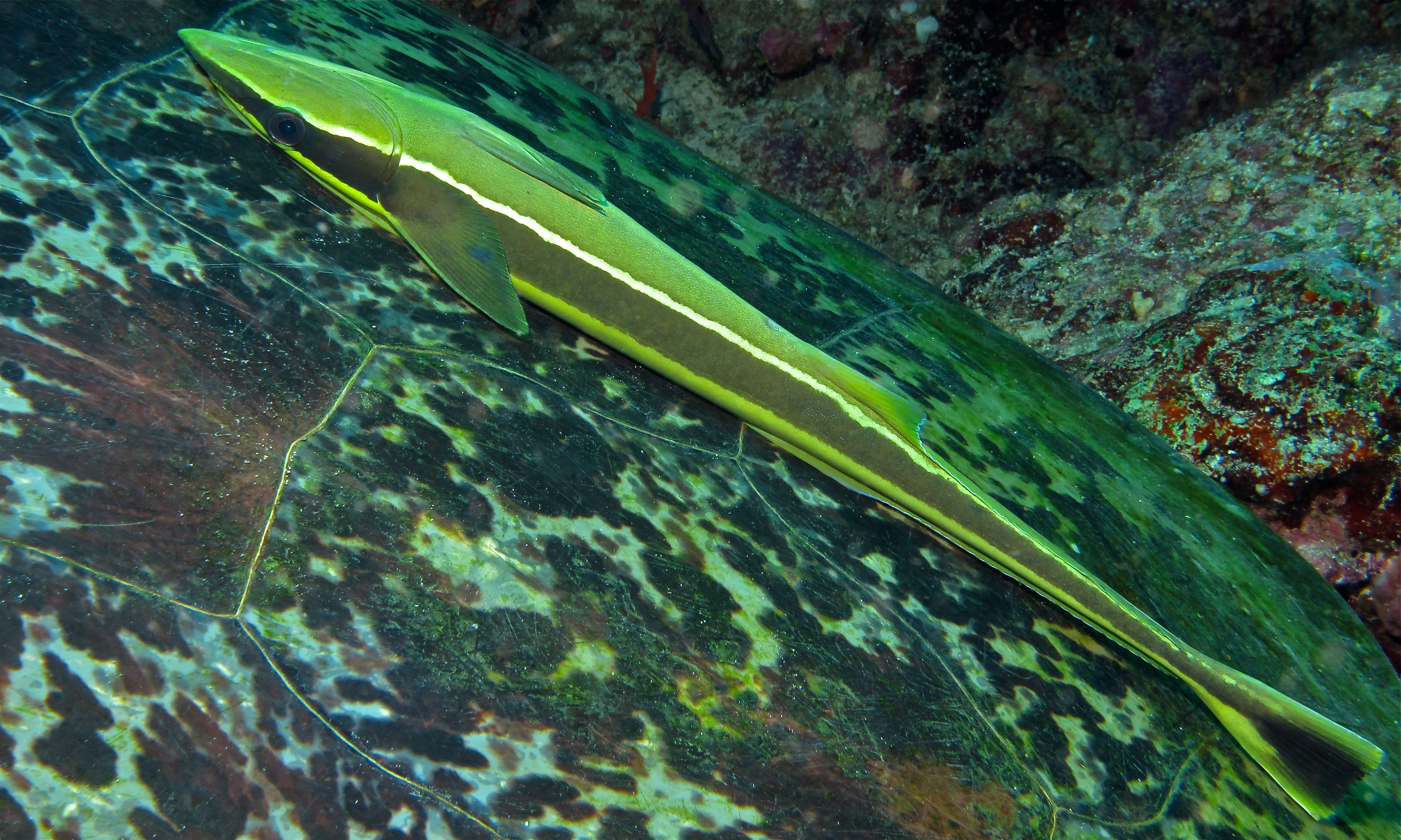 Likuan I, Bunaken Island, Sulawesi, INDONESIA